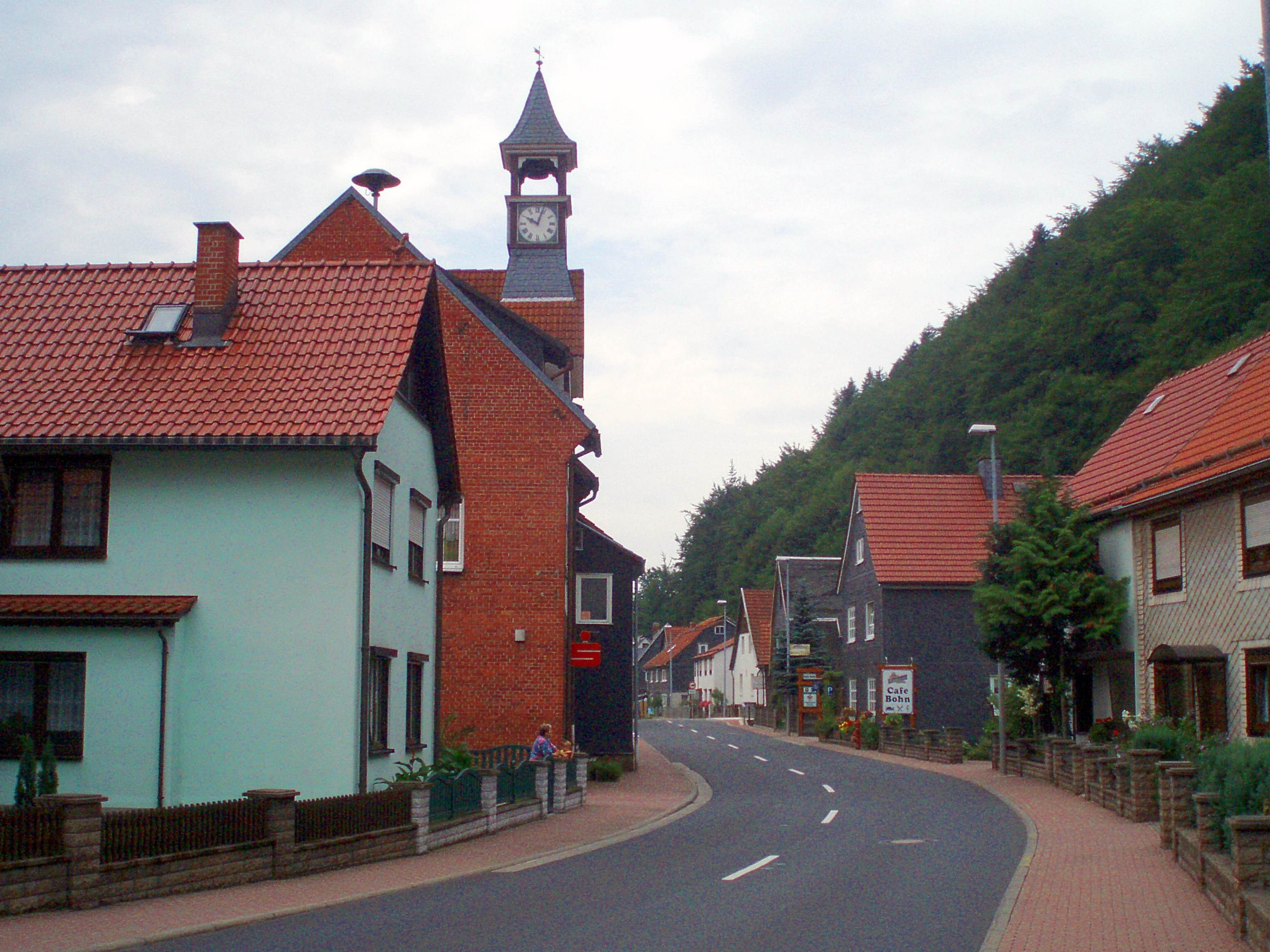 Scheusingerneundorf